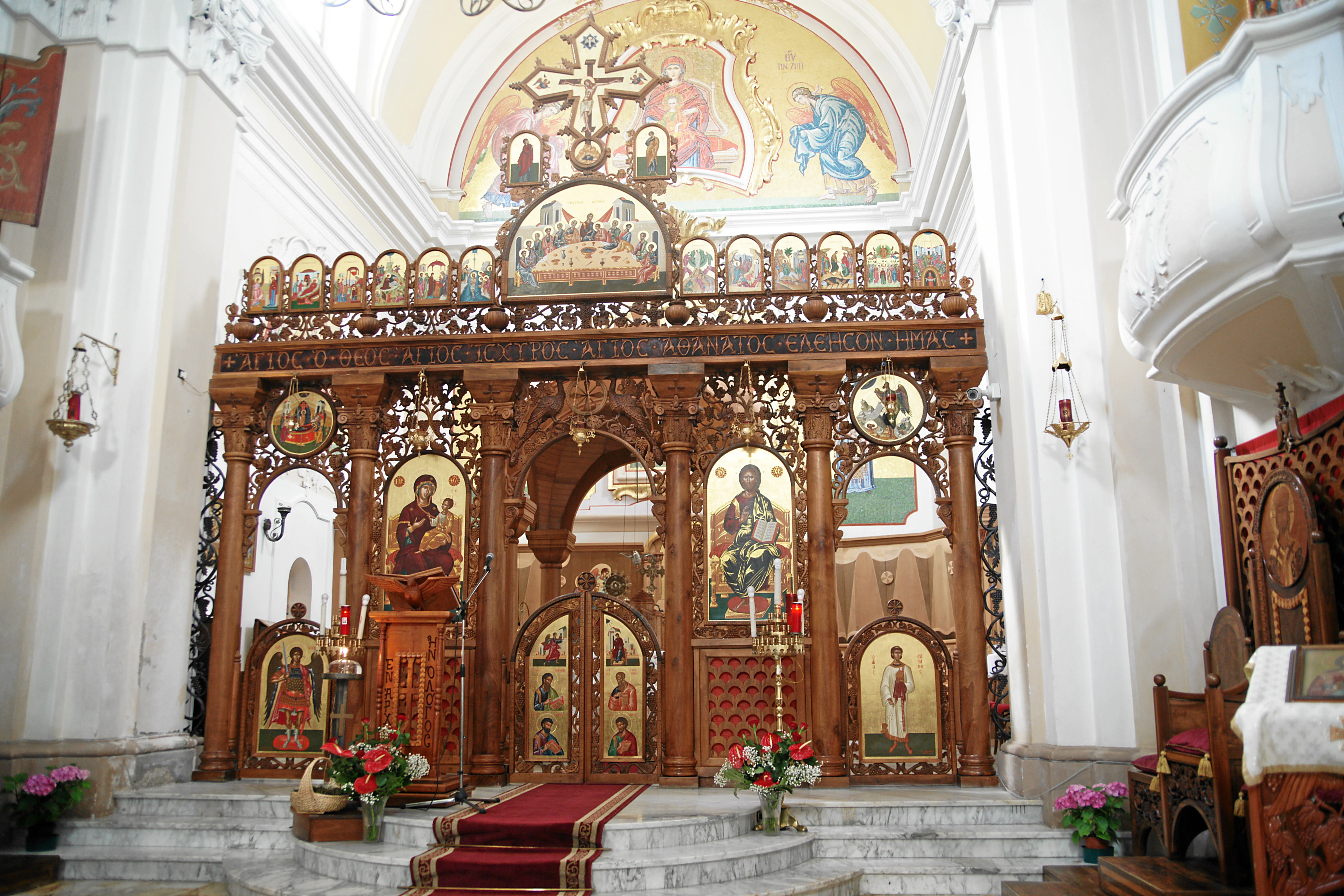 Chiesa madre, Civita: Ikonostase